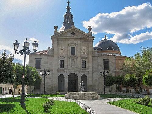 Convento. Loeches, Comunidad de Madrid, España (Spain)